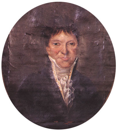 Berr Isaac Berr (* 1744 in Nancy; gest. 5. November 1828 in Turique bei Nancy), Vorkämpfer der Judenemanzipation in Frankreich